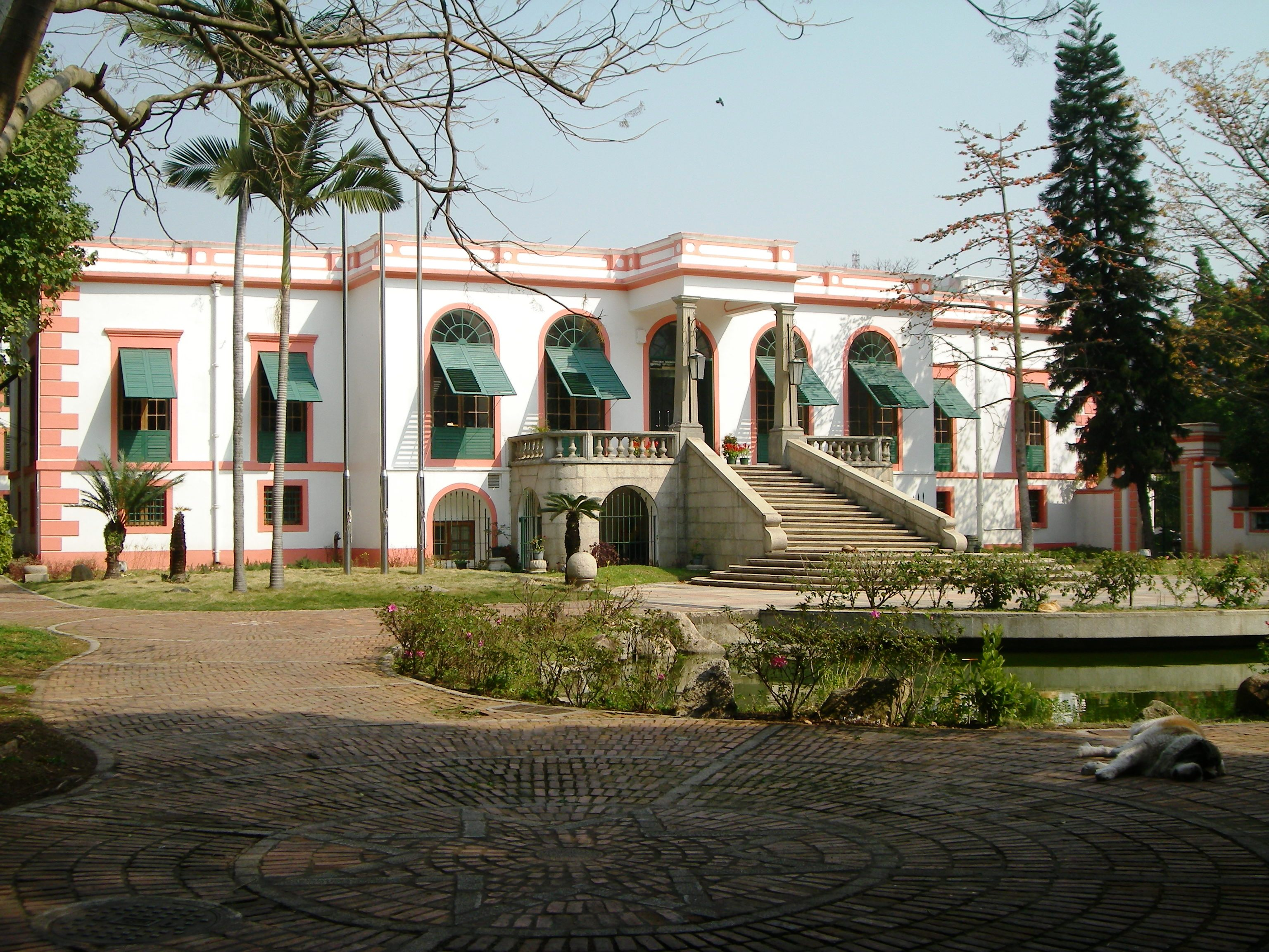 Casa Garden, Macau